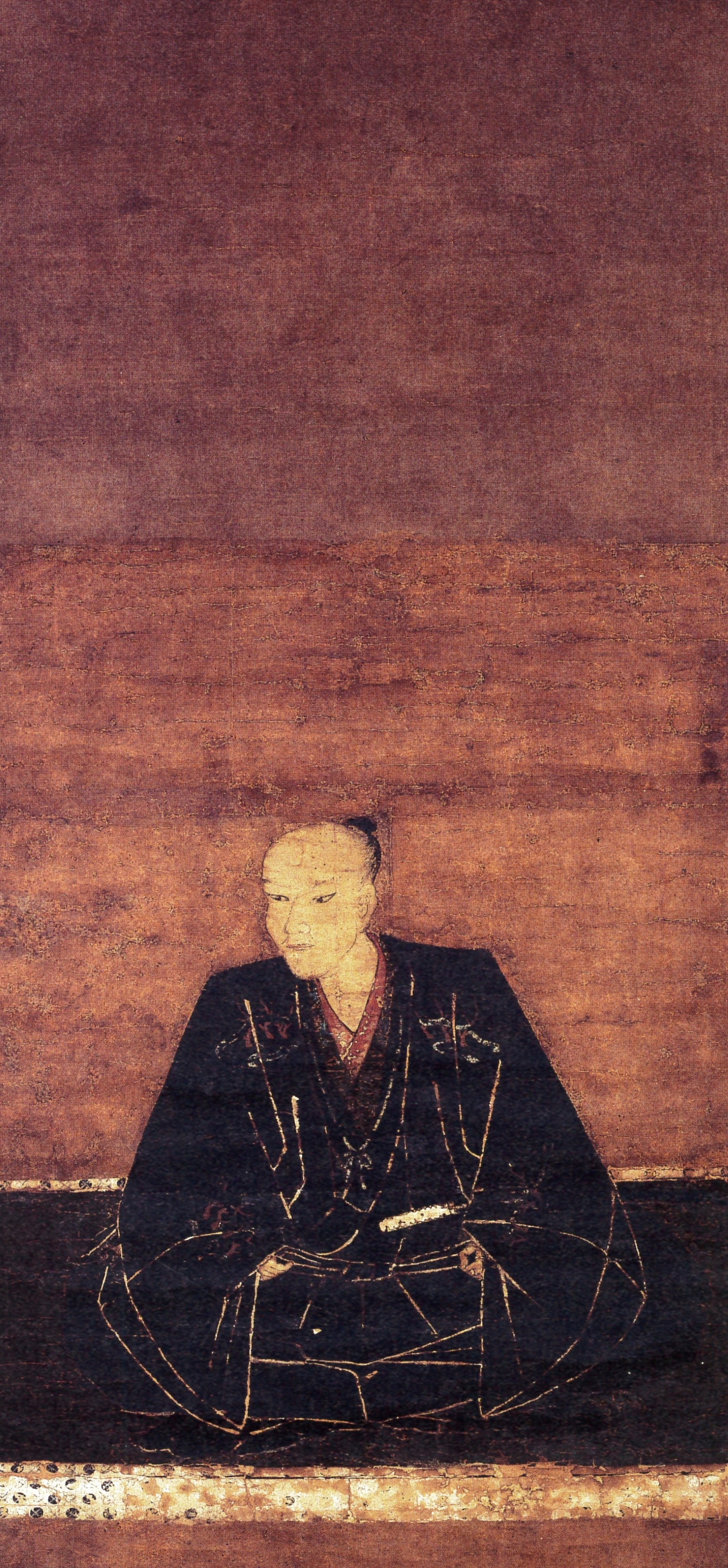 毛利興元の肖像。